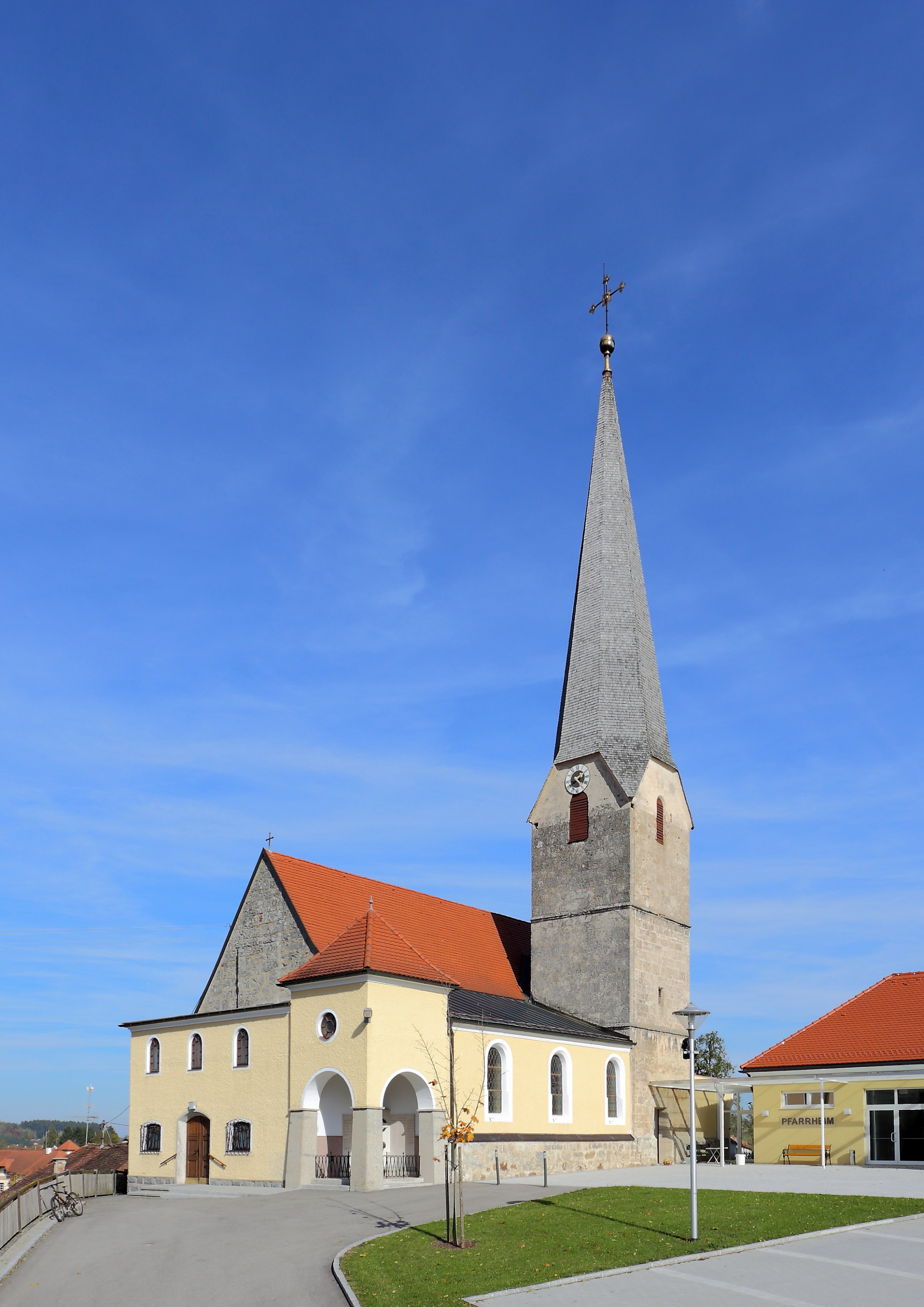 Südwestansicht der katholischen Pfarrkirche hl. Kreuz in der oberösterreichischen Gemeinde Senftenbach. Eine spätgotische Kirche mit einem einschiffigen, dreijochigen Langhaus, einem leicht eingezogenen einjochigen Chor und einem Turm im südlichen Chorwinkel. Ende des 19. Jahrhunderts wurde südseitig ein dreijochiges Seitenschiff angebaut.